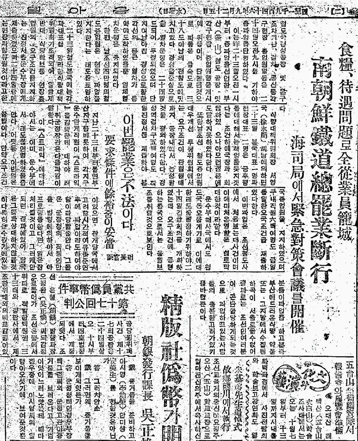 1946년 9월 25일 동아일보 식량, 대우문제로 전종업원농성 / 해사국에서 긴급대책회의를 개최 남조선철도총파업단행(南朝鮮鐵道總罷業斷行) "파업은 불법이다. 요구조건에 여유 줌이 타당" - 군정장관